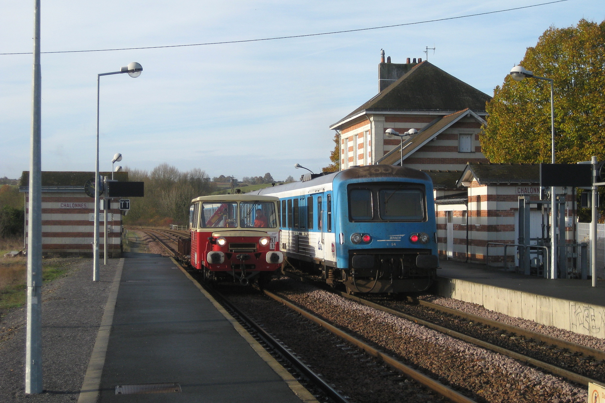 UM d'X4630 (EAD) et draisine se croisent en gare de Chalonnes.